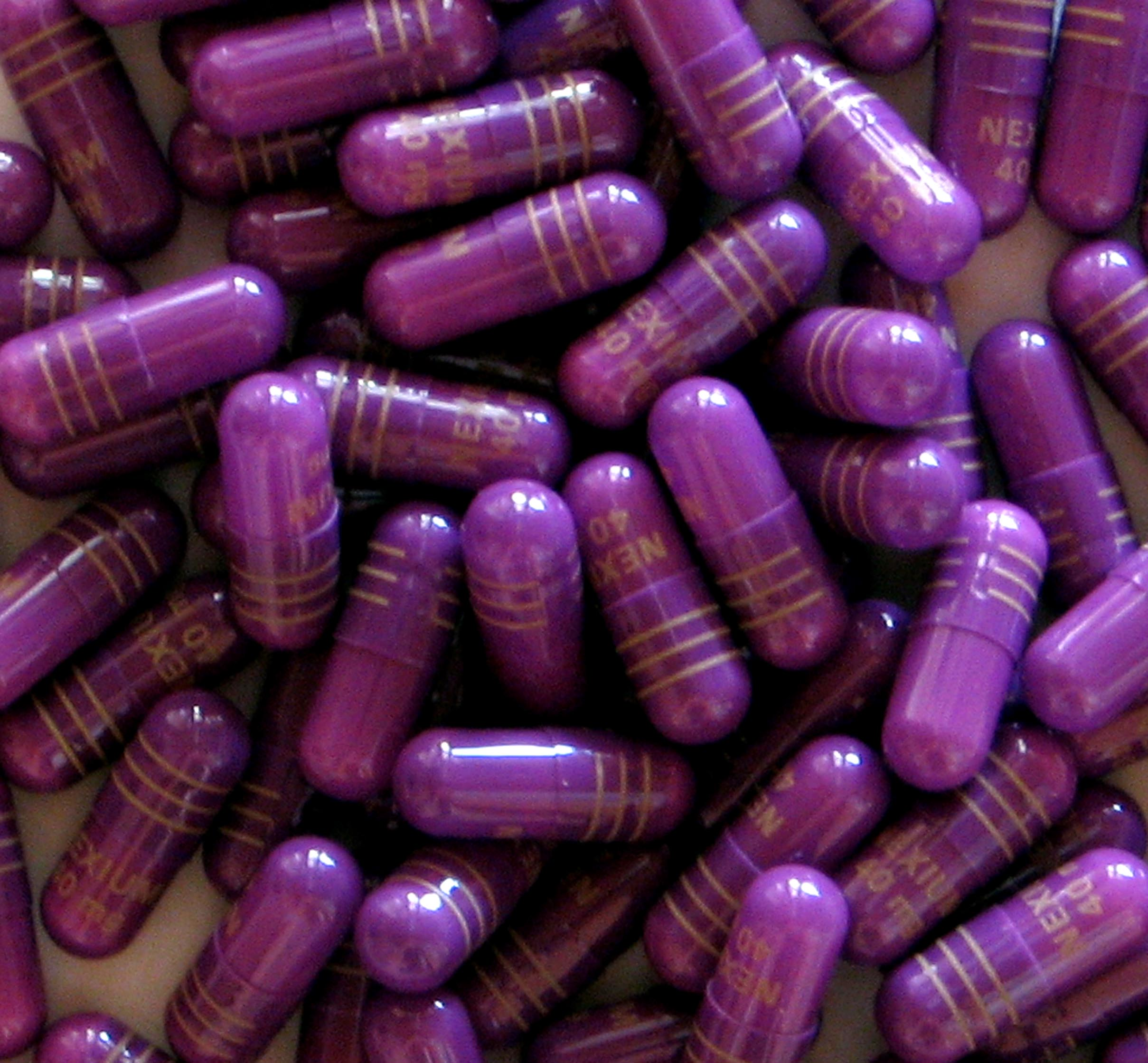 Nexium